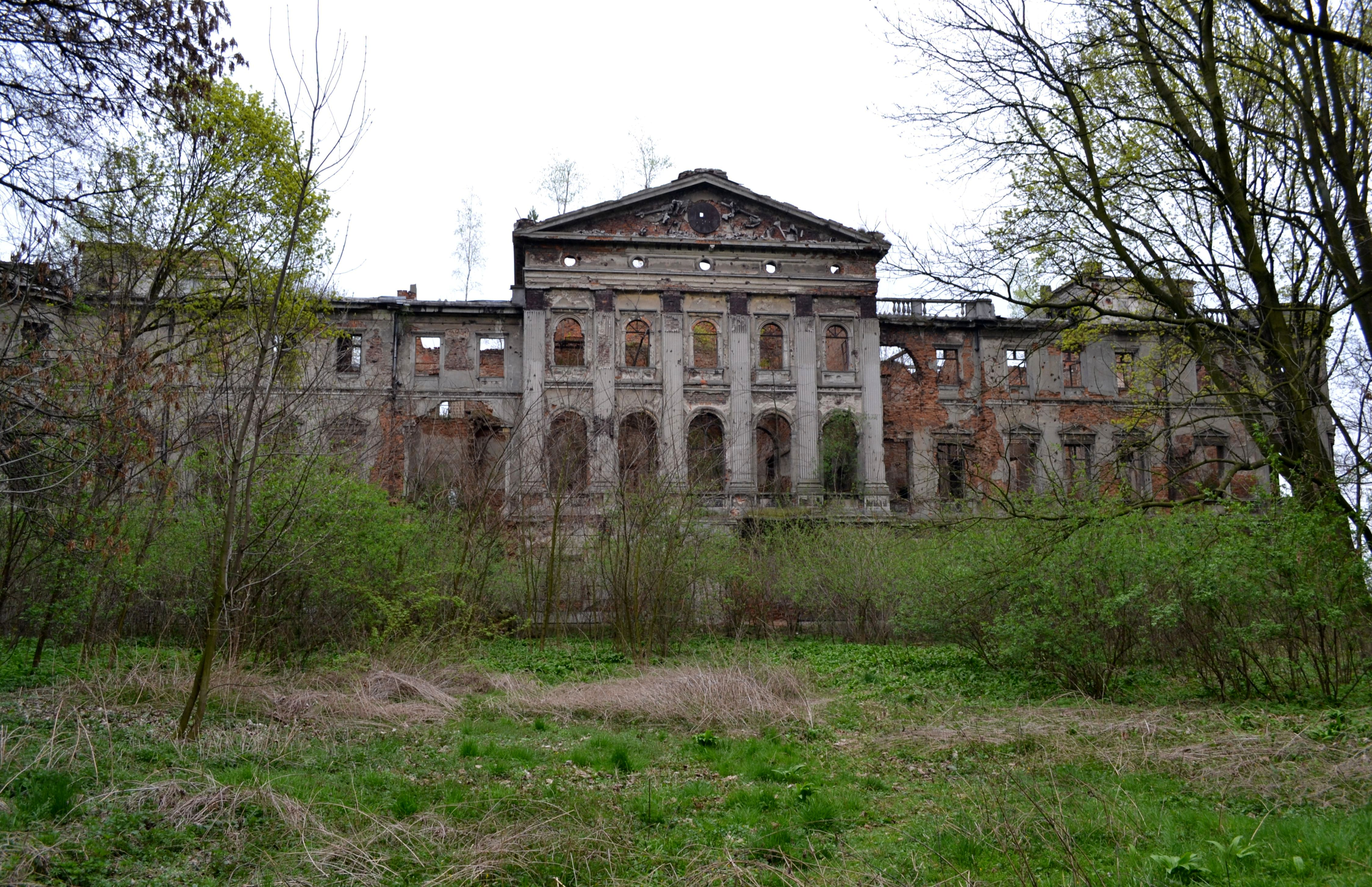 Sławików, pałac, XVIII/XIX w.